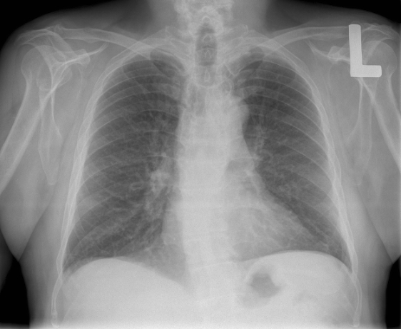 Een veelgemaakte röntgenfoto is de thoraxfoto. Deze thoraxfoto (ook wel longfoto genoemd) van een man van ongeveer 50 jaar heb ik zelf gemaakt op de röntgenafdeling in Baarn (sept 2004). Hierbij heb ik gebruik gemaakt van een fosforplaat. Te zien op de foto zijn de longen (donker) met hier tussenin het hart. De L (rechts boven) geeft aan dat daar de linkerkant van de patiënt is. Deze L staat over het schoudergewricht geprojecteerd. De andere schouder is beter zichtbaar, te onderscheiden zijn oa. bovenarm, schouderblad en sleutelbeen. De longen worden aan de onderzijde begrensd door het middenrif, wat niet zichtbaar is. Hieronder begint de buik. Het donkere vlekje in de buik is een beetje lucht dat zich in een darmlis bevindt.